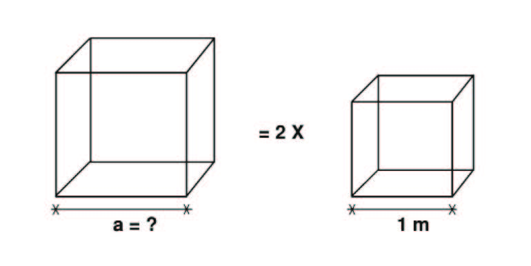 Representação gráfica do Segundo Problema Clássico da Geometria: O Problema da Duplicação do Cubo.